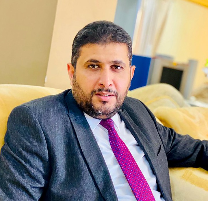 وزير المالية والاقتصاد المفوض في حكومة الوفاق الوطني الليبية